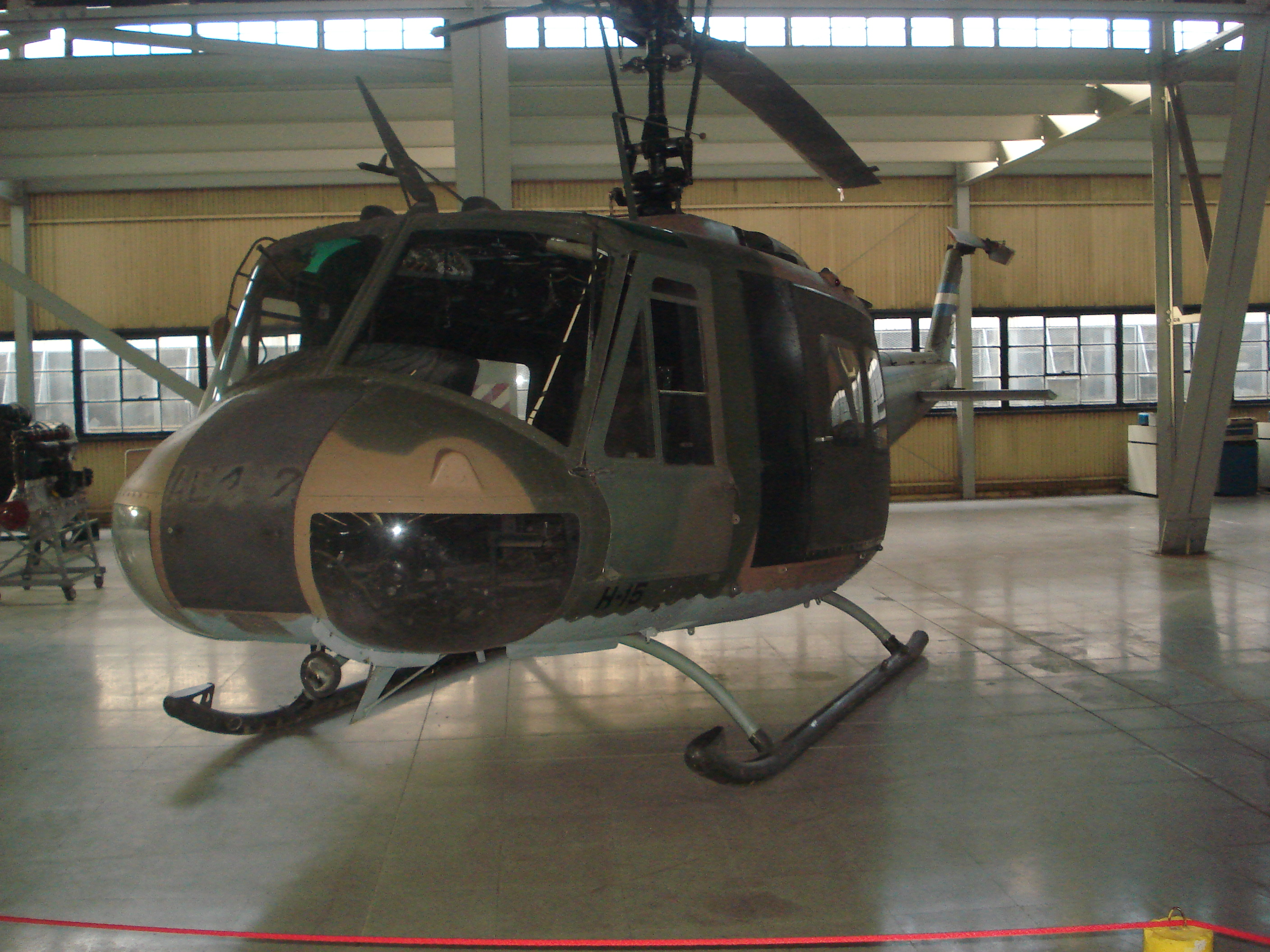 Bell UH-1 Huey en exposición.